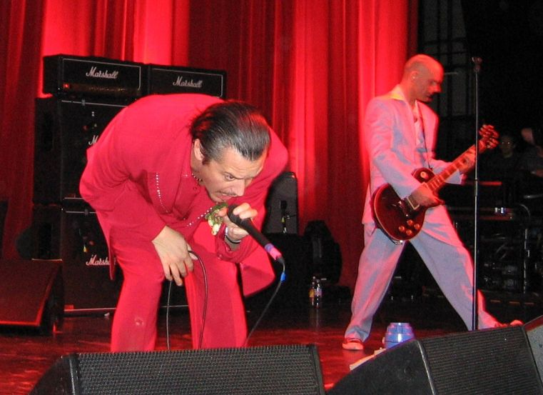 Faith No More in der Frankfurter Jahrhunderthalle im Rahmen der Europa-Tournee zu ihrer Wiedervereinigung